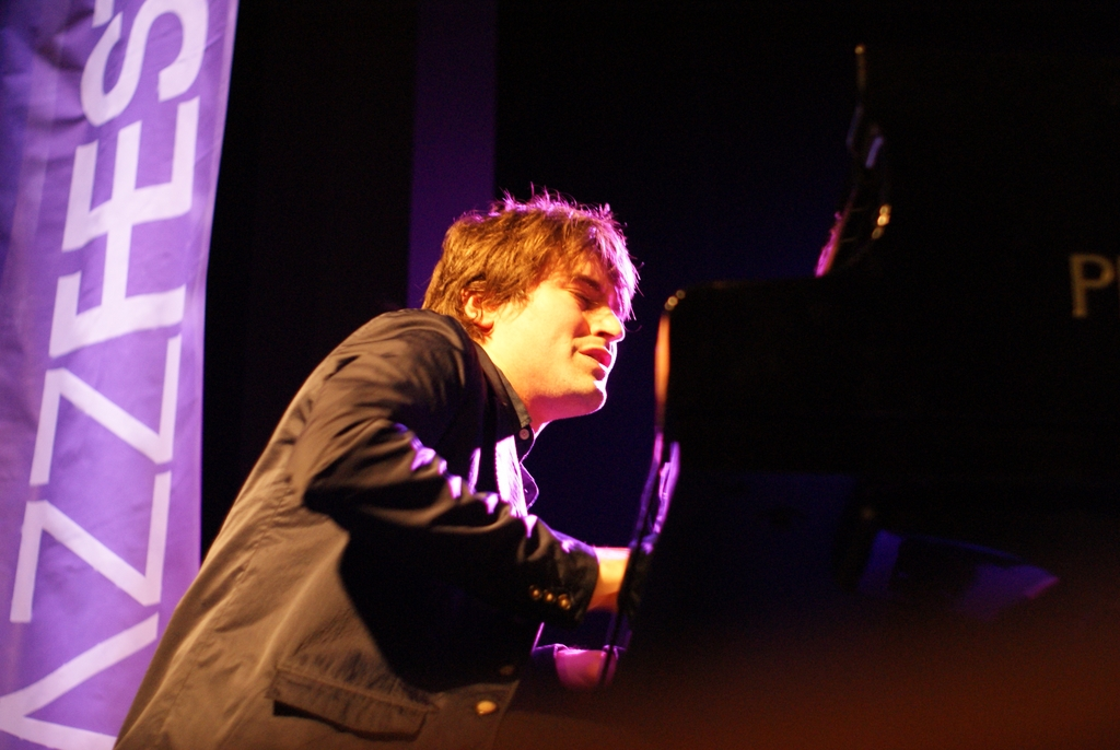 Dan Tepfer Trio, Semilasso, JazzFestBrno